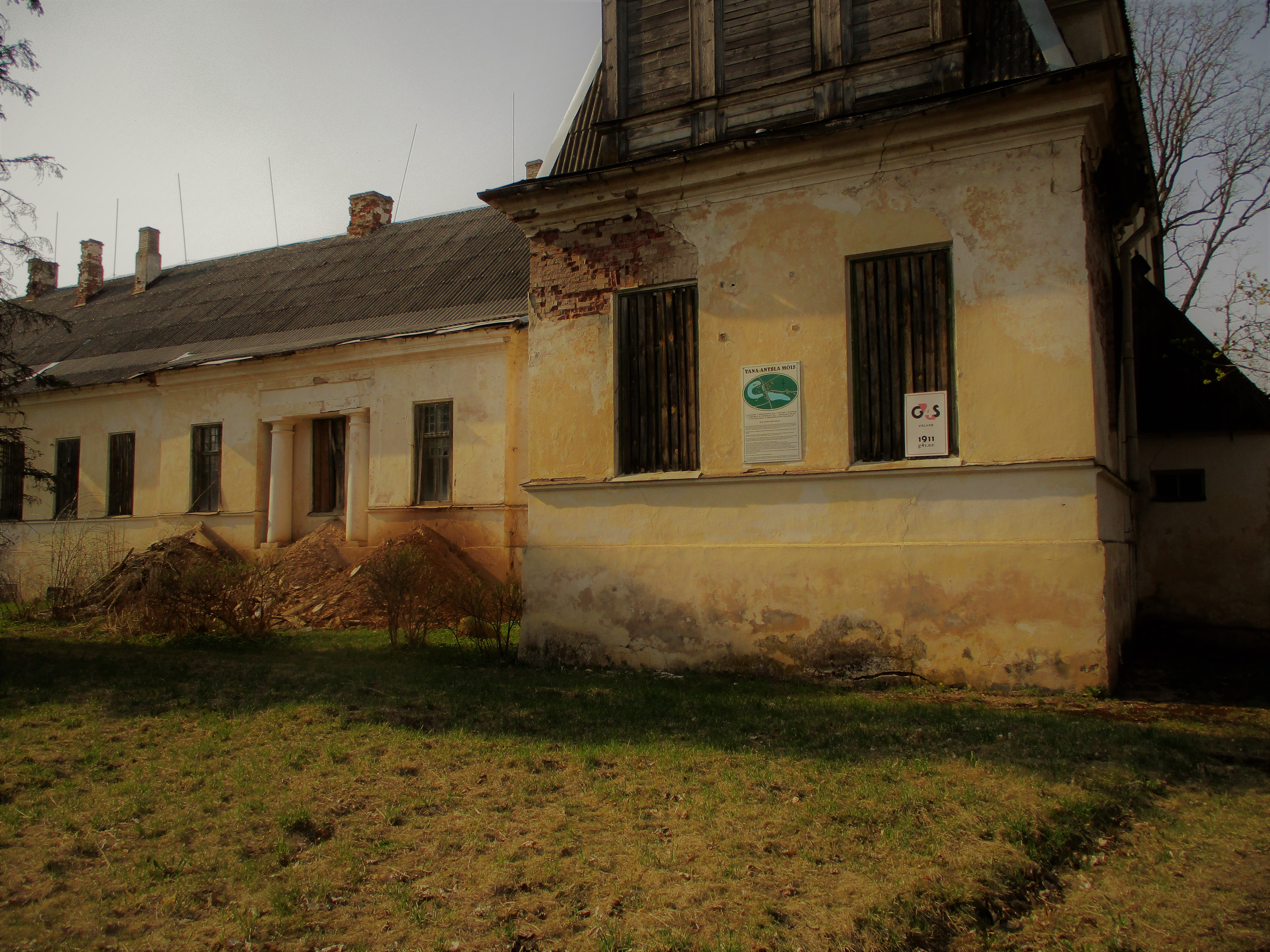 Vaade kagust mõisa peahoone idaküljele. Peahoone kohal arvatakse olevat asunud peamised linnuseehitised.